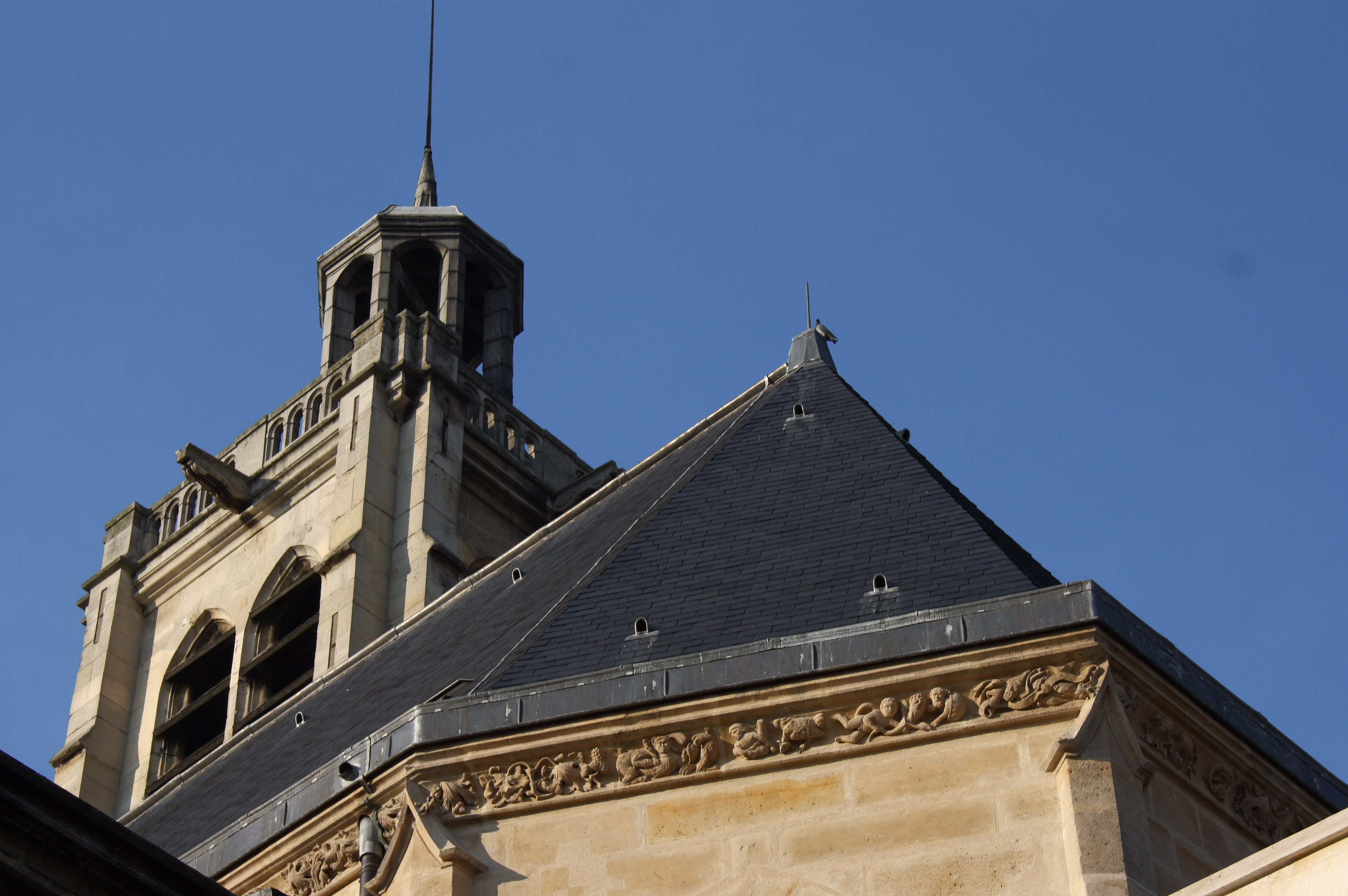 Katholische Pfarrkirche Saint-Laurent im 10. Arrondissement von Paris, Fries an der Apsis